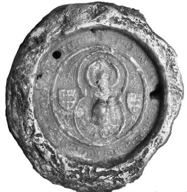 Szécsényi Simon országbíró pecsétje 1395-ből